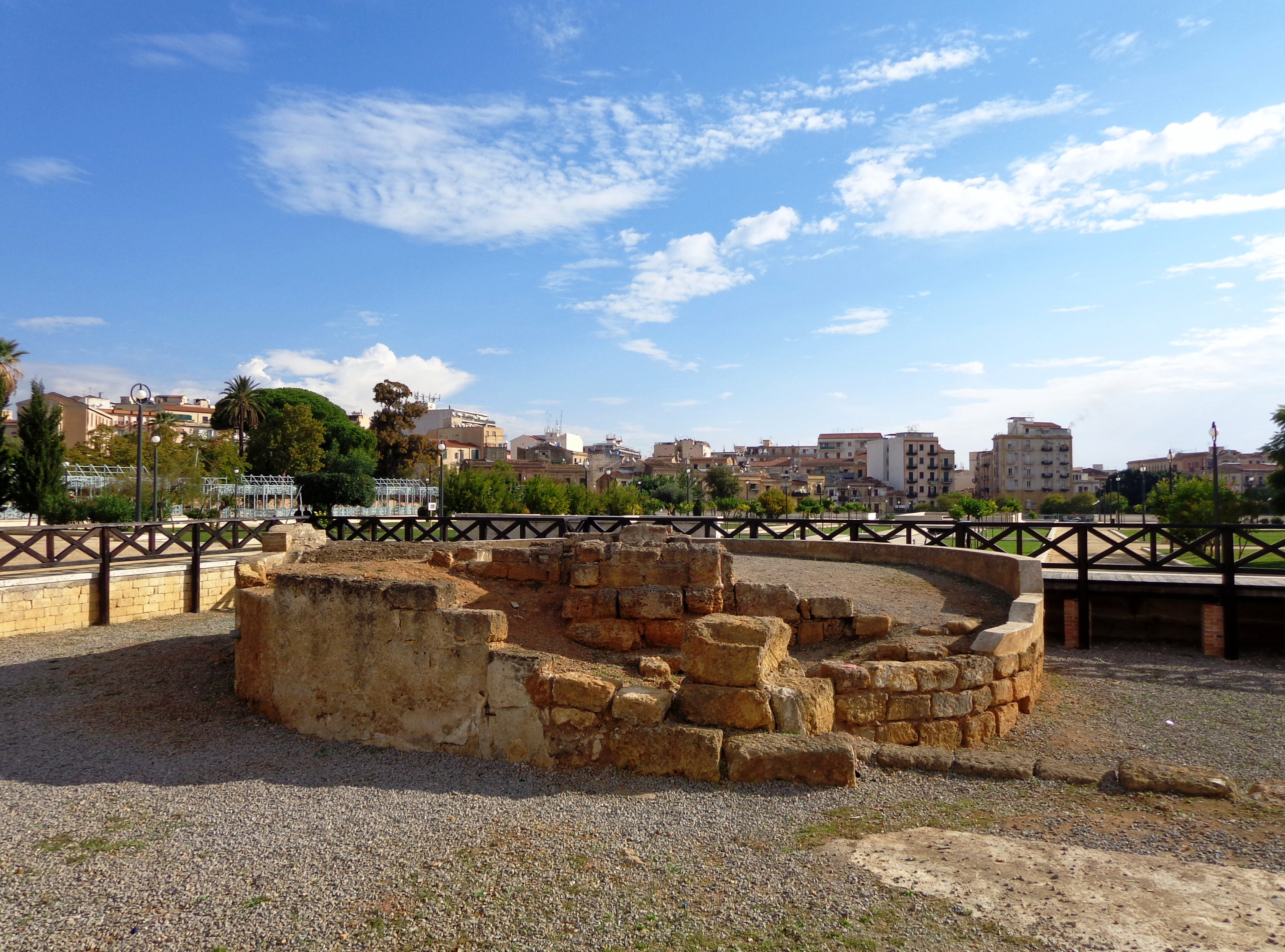 Palazzo Zisa PA 04